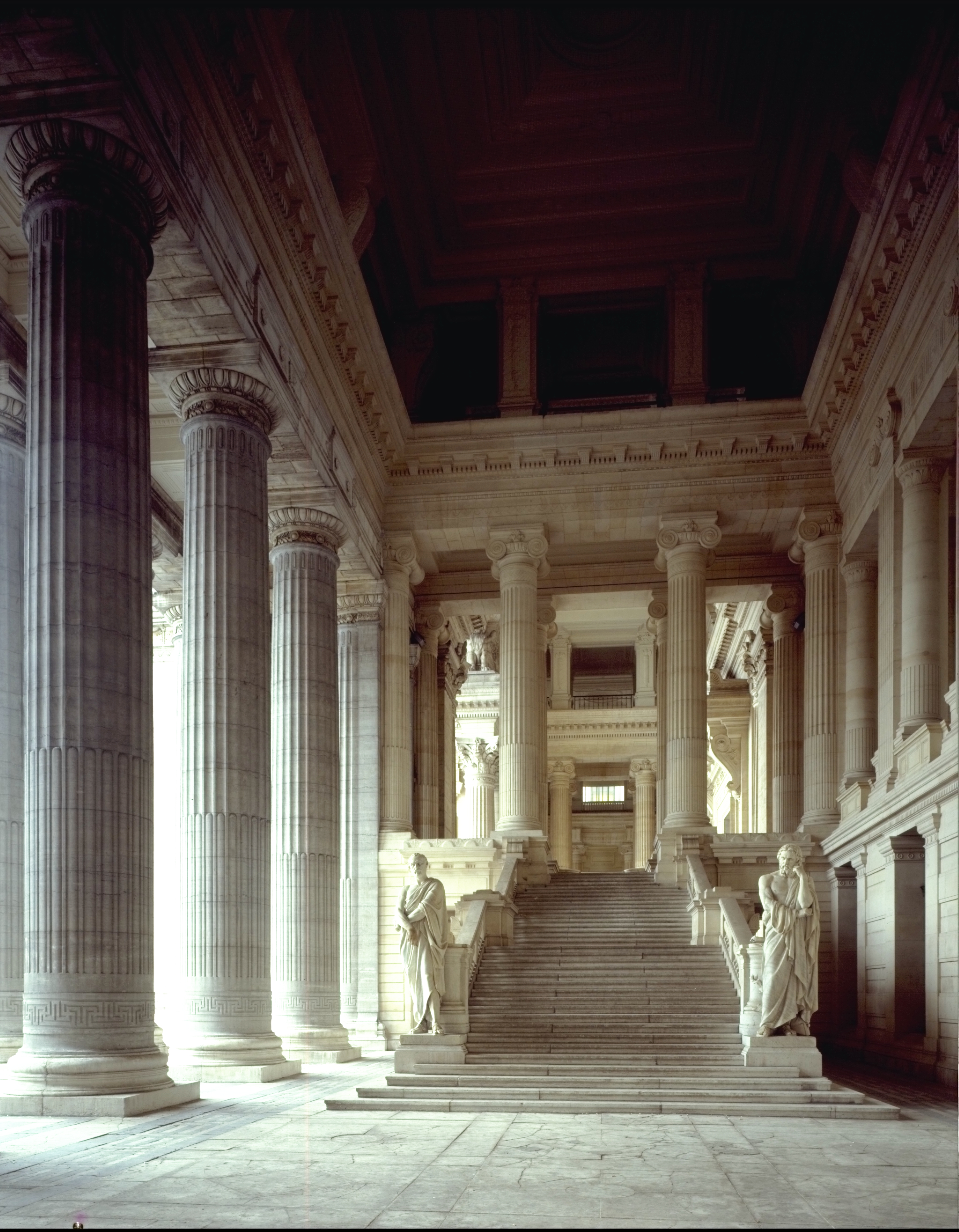 Het Justitiepaleis: detail - interieur: peristilium